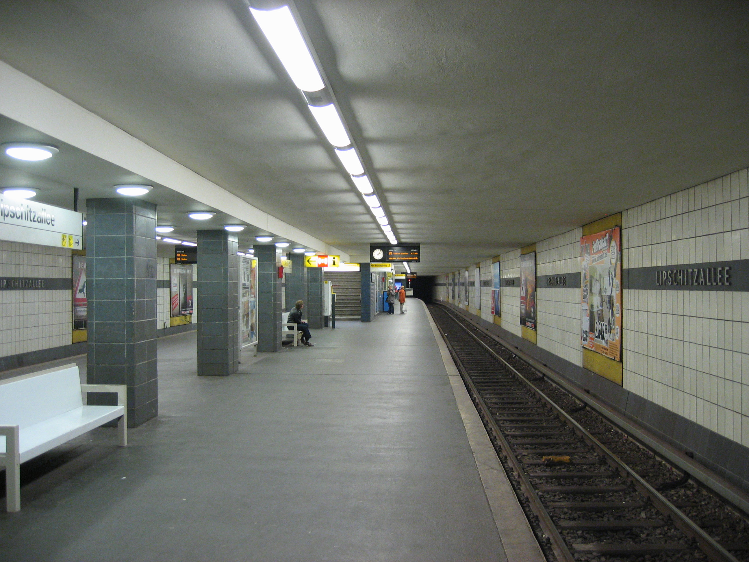 U-Bahnhof Lipschitzallee, Berlin